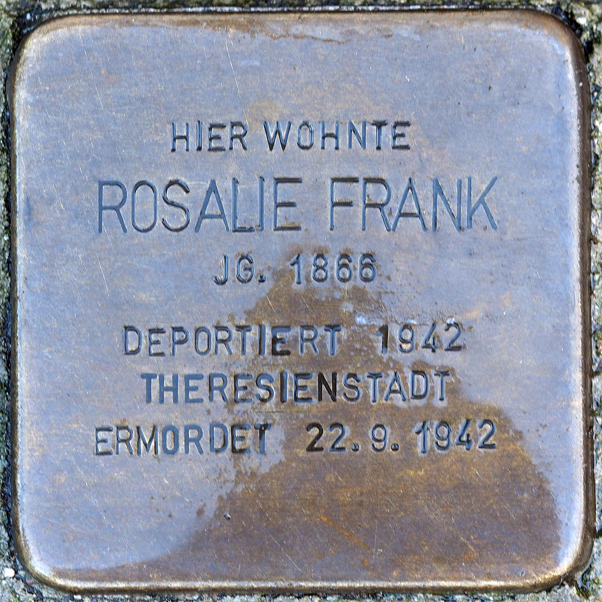 Stolpersteine Grefrath: Frank, Rosalie